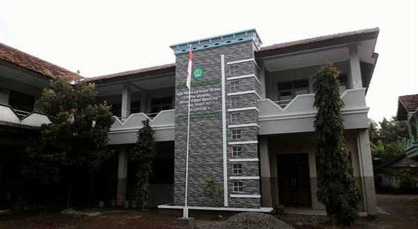 Foto gedung MI YAPIM Ngagel